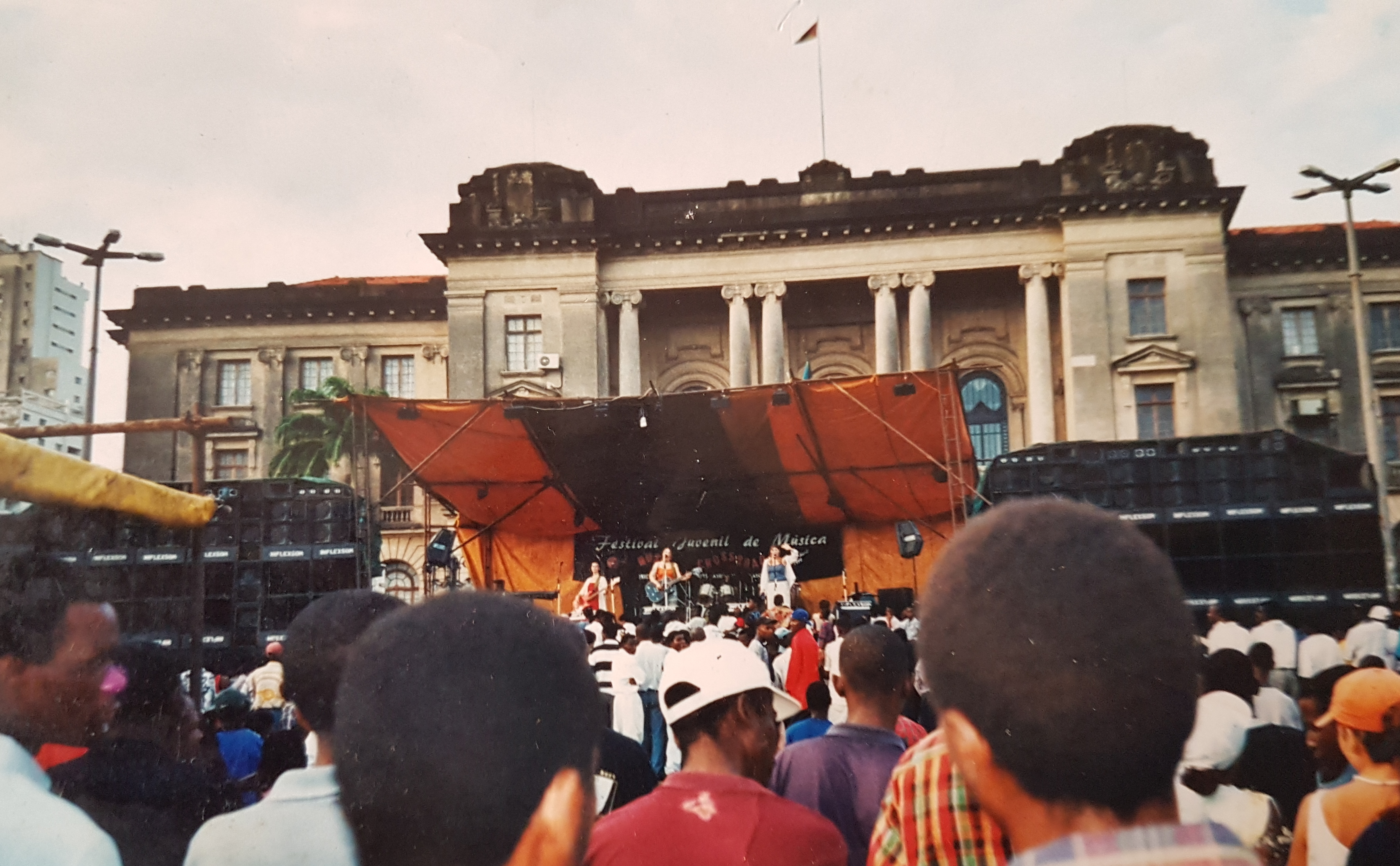 Lily Of The Valley live in Maputo, Africa 1999